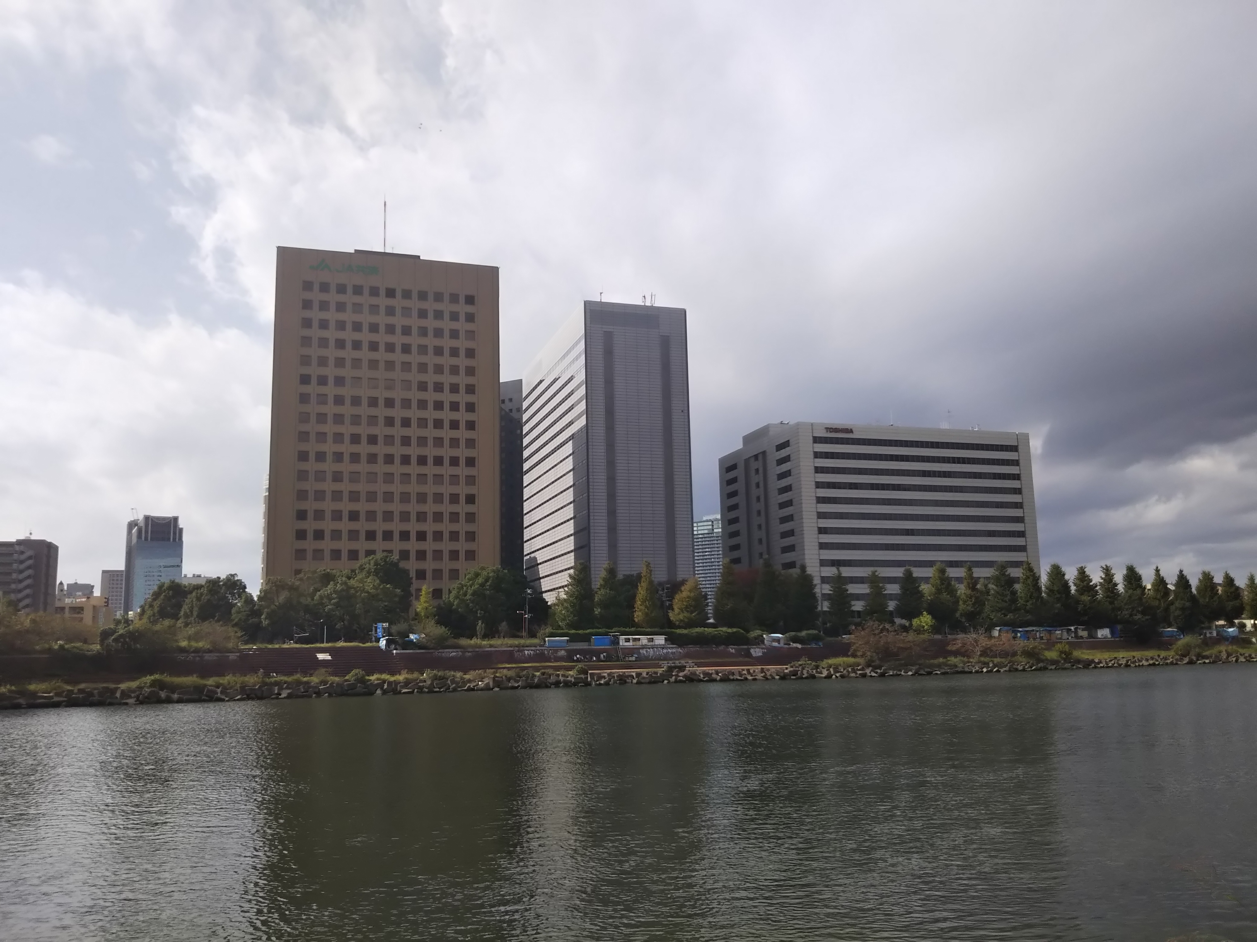 川崎市川崎区のかわさきテクノピア。多摩川の対岸の東京都大田区側より